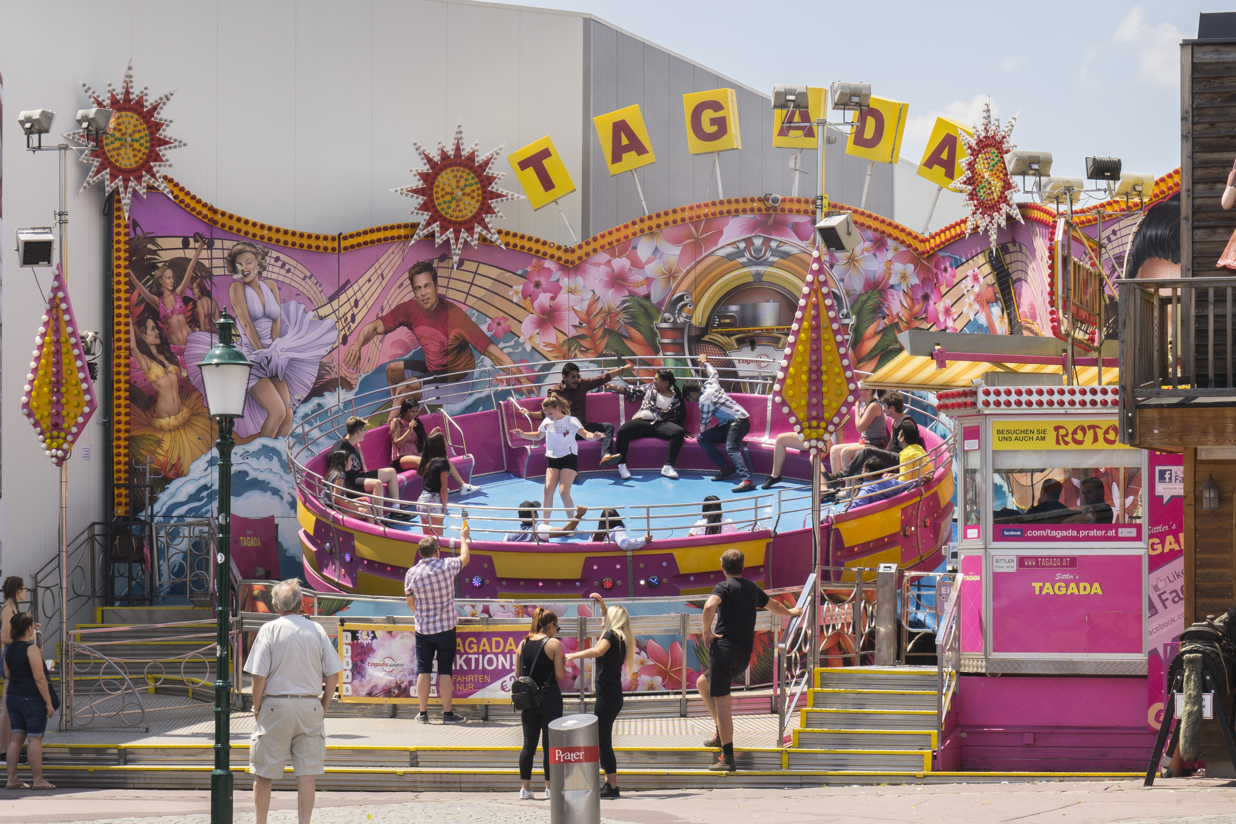 Tagada, Wiener Prater